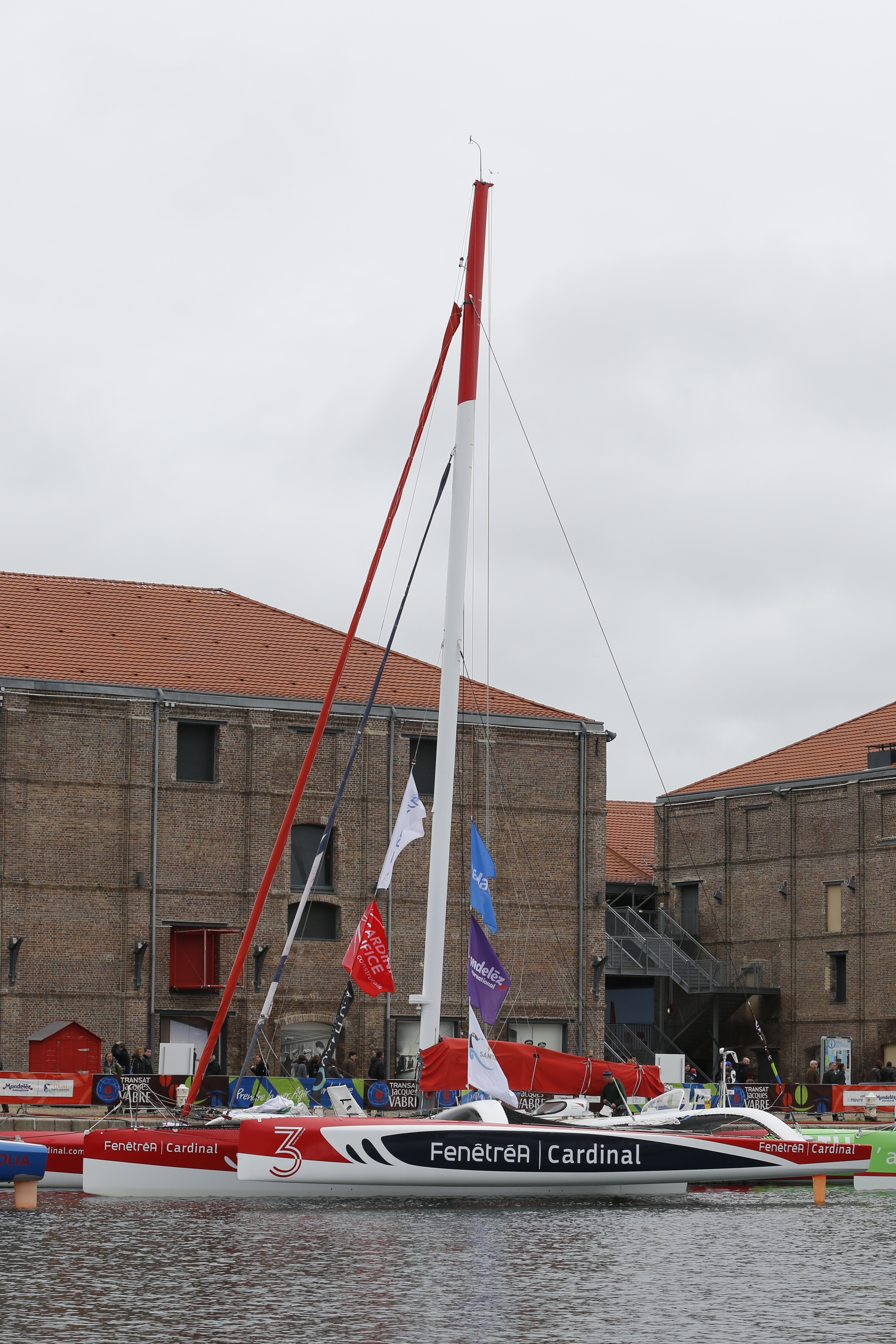 FenêtréA Cardinal au départ de la Transat Jacques Vabre 2013.